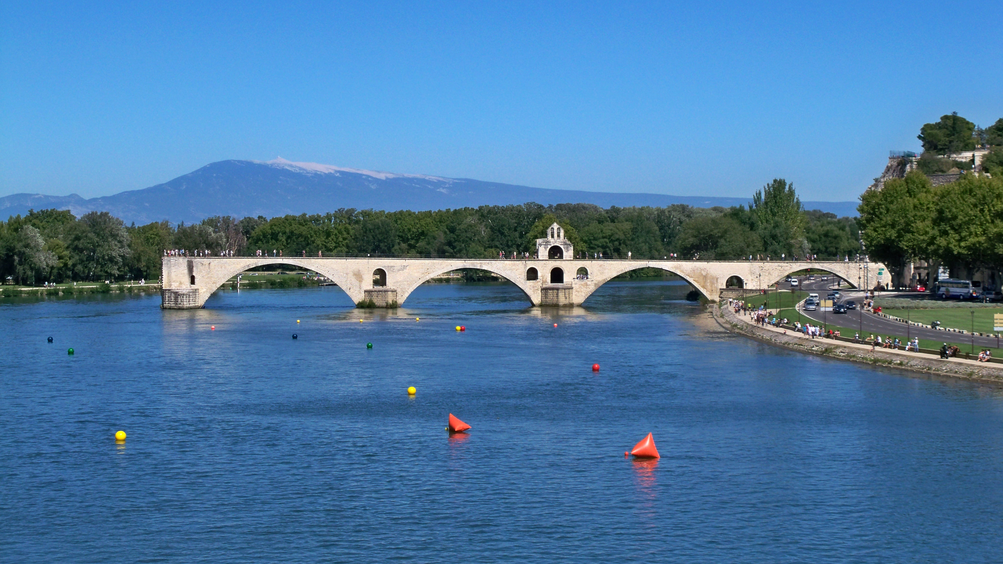 Pont Sint Bénézet avec vue sur le Mont Ventoux